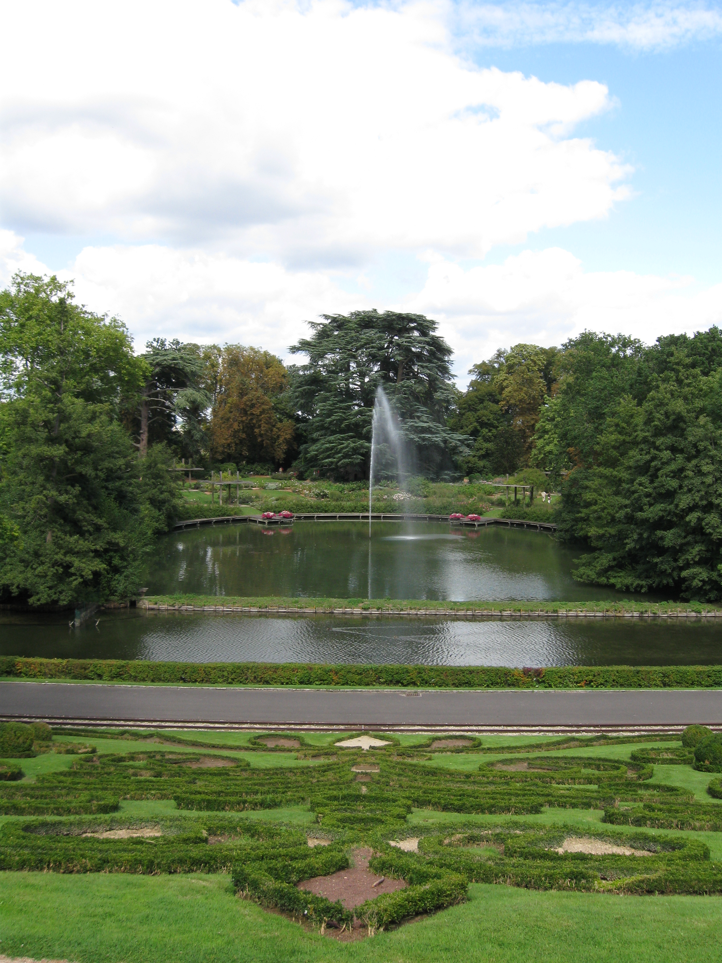 Parc Floral de la Source, Orléans, Loiret, France. Pièce d'eau "le Miroir". Vue vers le nord depuis le château de la Source.